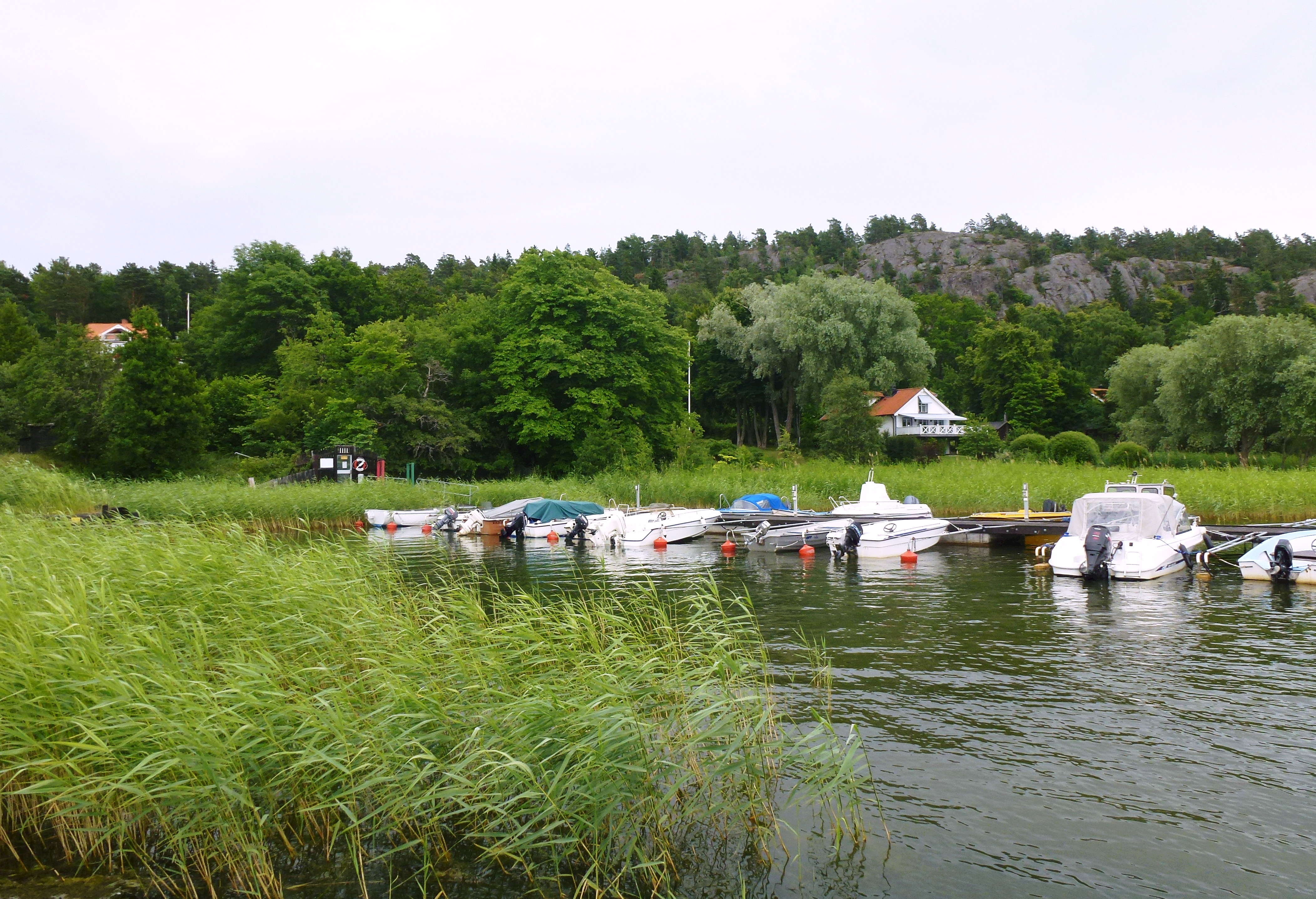 Tyresö Brevik Tegelbruket